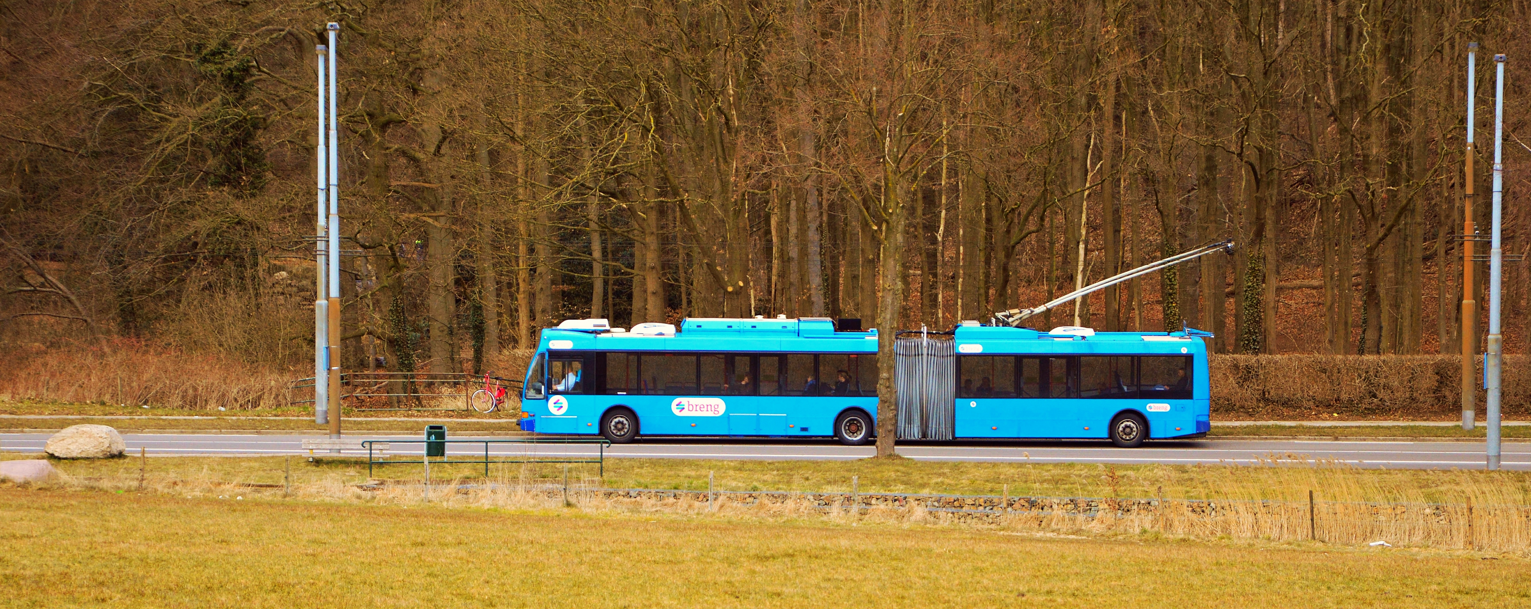 De lijn verbindt Oosterbeek (Station) via het gemeentehuis van Oosterbeek, door Mariëndaal, langs het Academie voor beeldende kunsten, het Centraal Station, door het Centrum van Arnhem, langs Station Velperpoort en door Plattenburg met Velp.